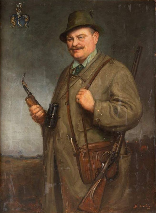 Portrait des Johannes Moorhart in Jägermontur mit Wappen in der oberen linken Ecke. Öl auf Holz. Größe: ca. 125cm x 89 cm. Signiert vom Autor "B. Liebig". Rückseitig betitelt: "H(J)ohannes Moorhart geb. 9.6.1864 ... gem(alt). v(on). Bernhard Liebig 1920 Frankfurt ..."